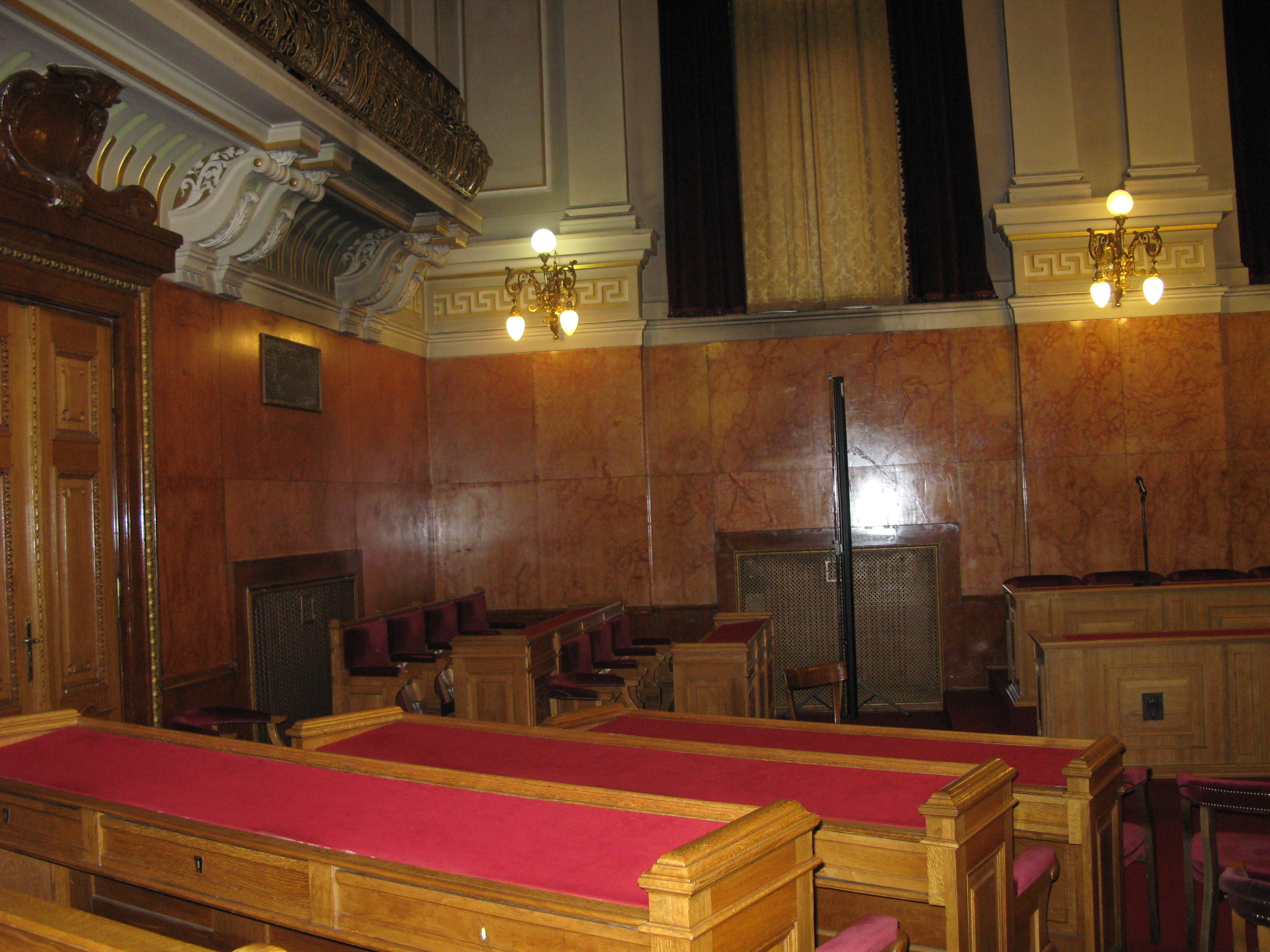 Svečana dvorana na Univerzi v Ljubljani